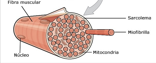 Célula muscular estriada (fibra muscular)